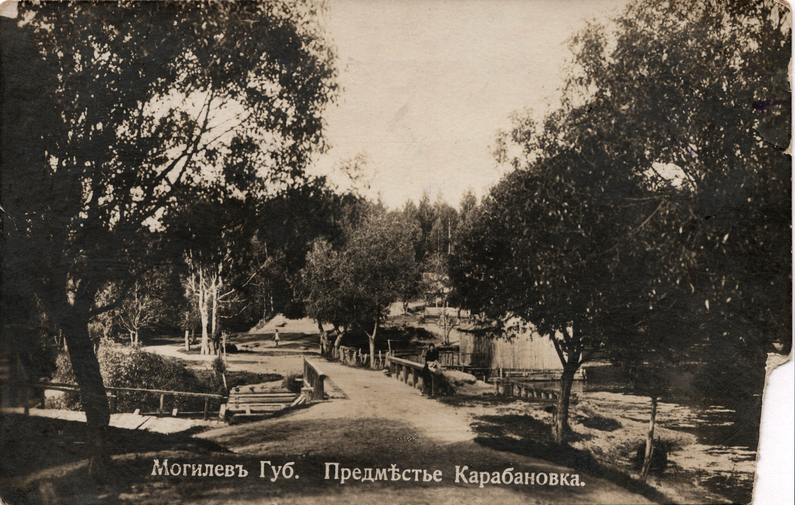 Беларуская (тарашкевіца): Магілёў (Mahiloŭ), прадмесьце Карабанаўка (Karabanaŭka)